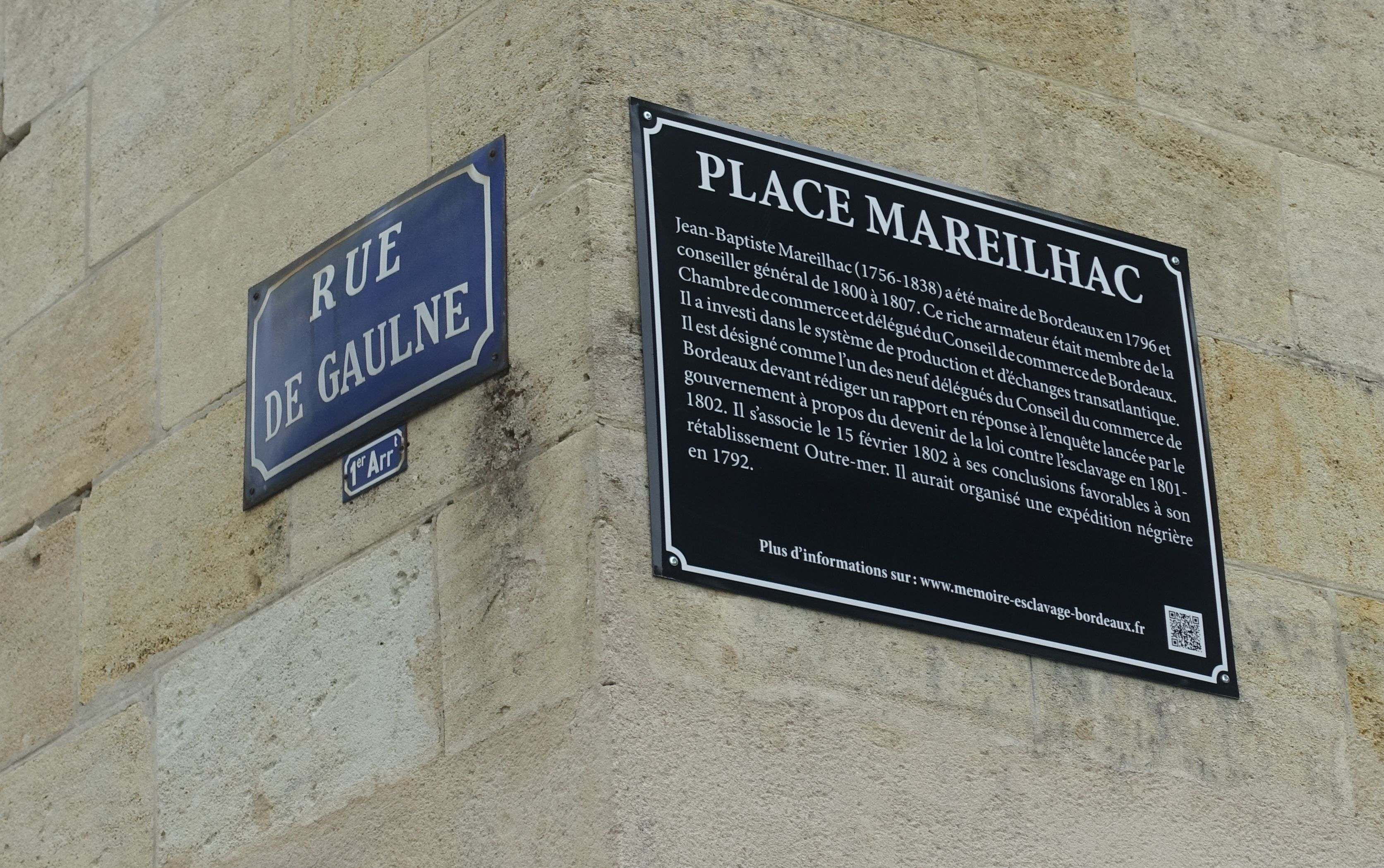 Plaque posée à Bordeaux en juin 2020